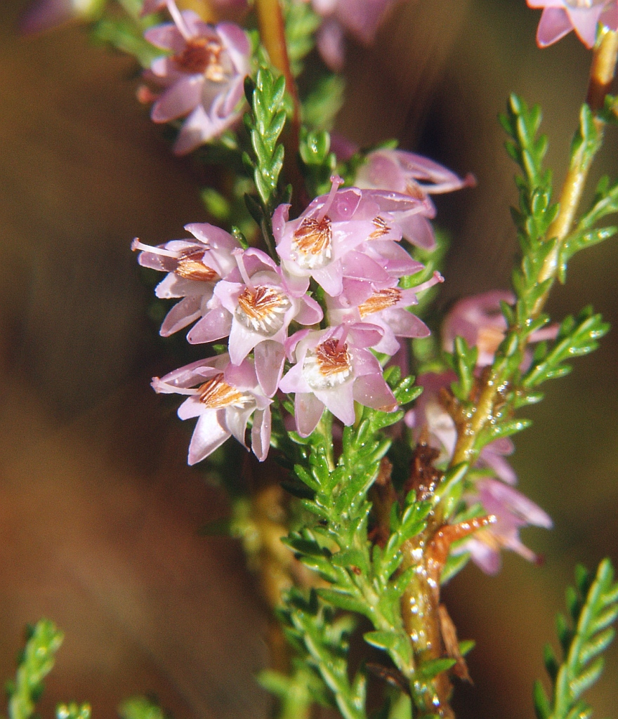 Calluna vulgaris, Spessart, Germany